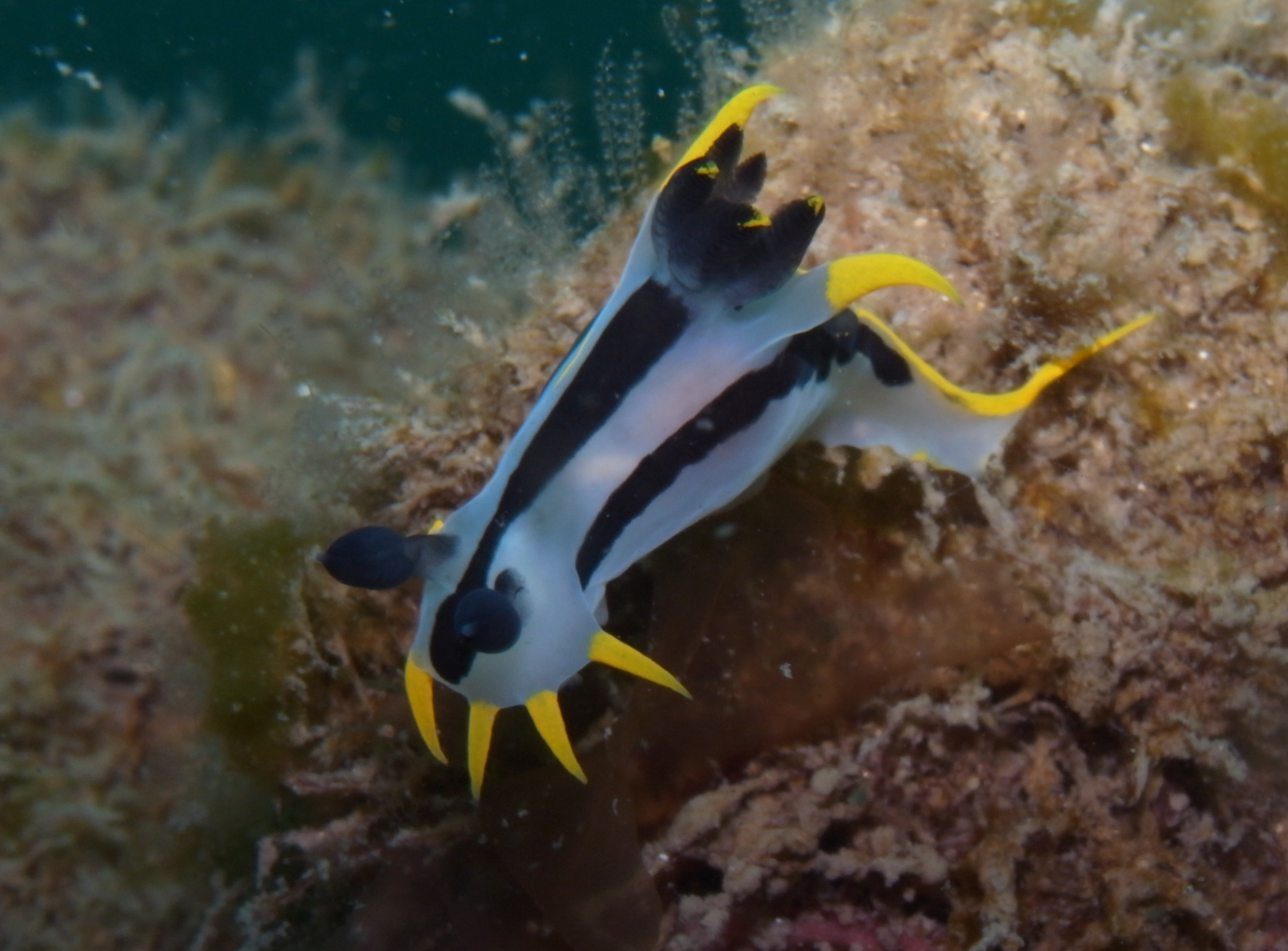 Polycera capensis, Nelson Bay, Nueva Gales del Sur, Australia